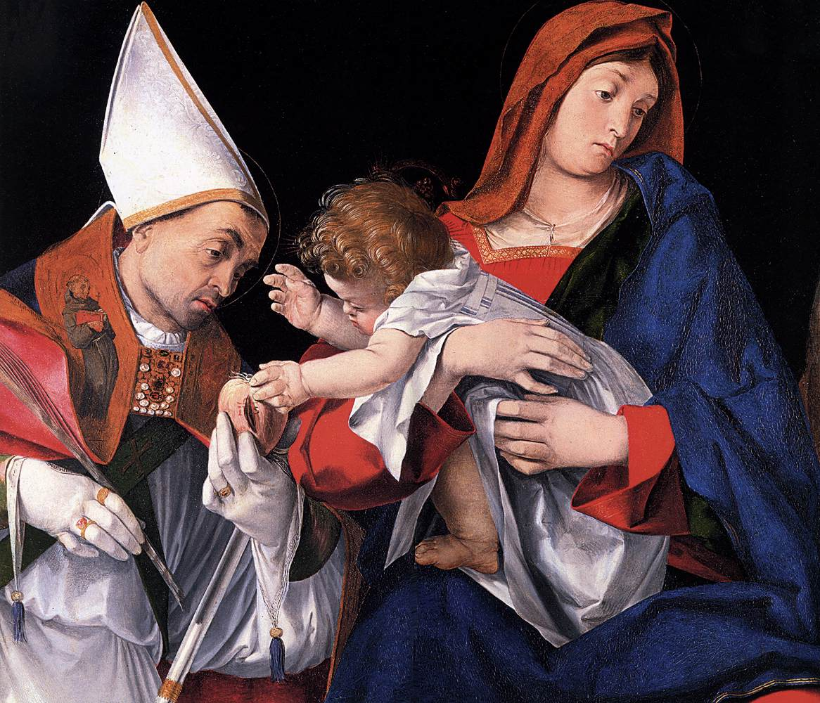 detail